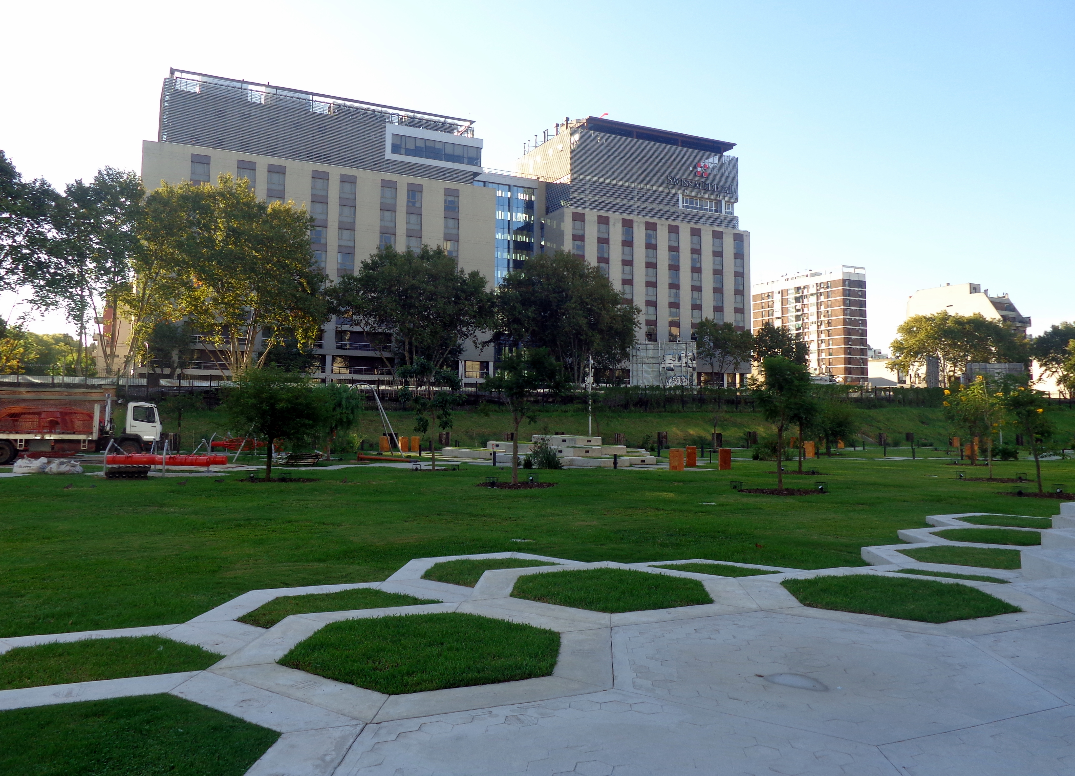 Parque de las Ciencias, en barrio de Palermo, Buenos Aires, Argentina. En el segundo plano se aprecia el Sanatorio de los Arcos (Av. Juan B. Justo 909), inaugurado el 7 de septiembre de 2006.